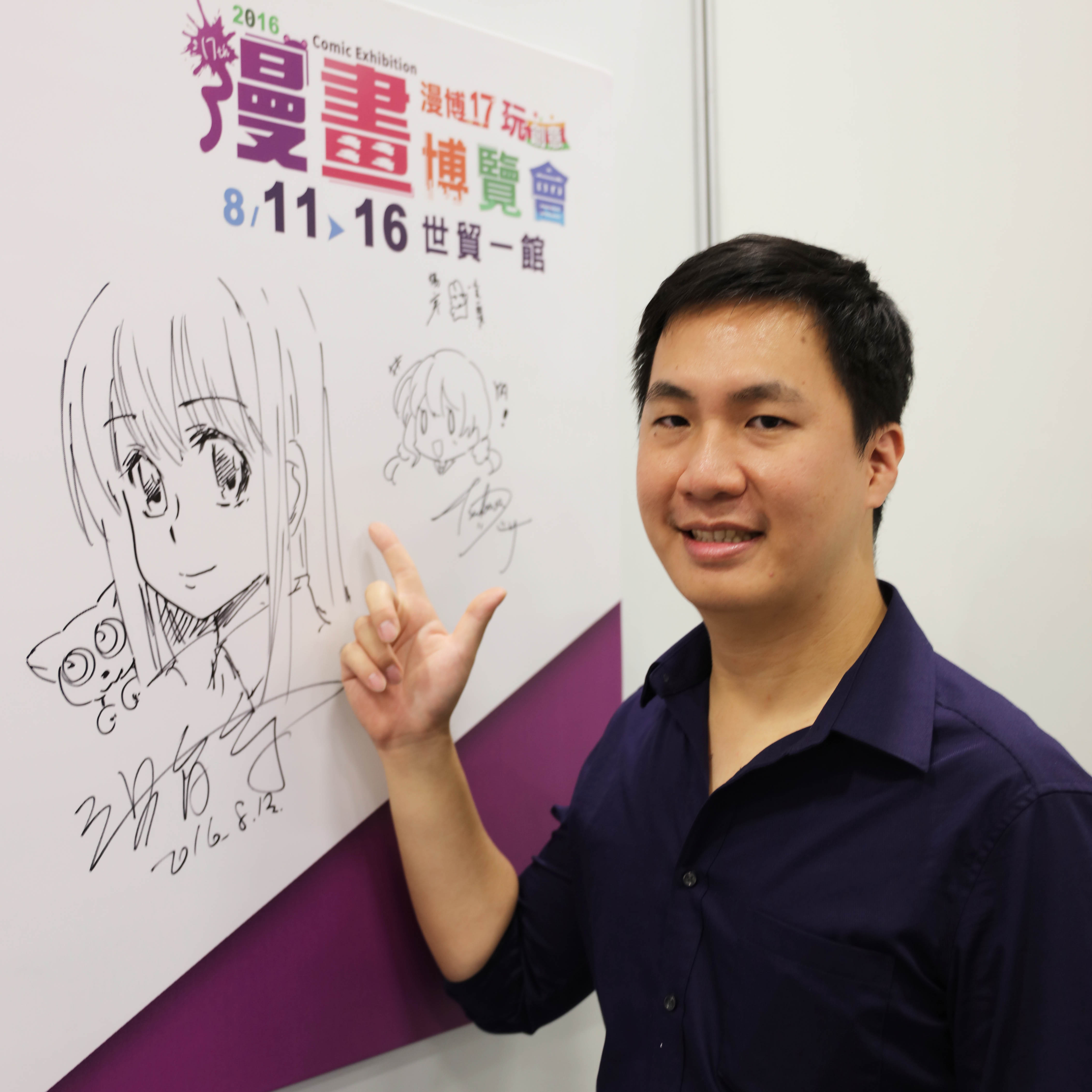 中文（台灣）: 漫畫家洪育府於2016年（第十七屆）漫畫博覽會簽名。